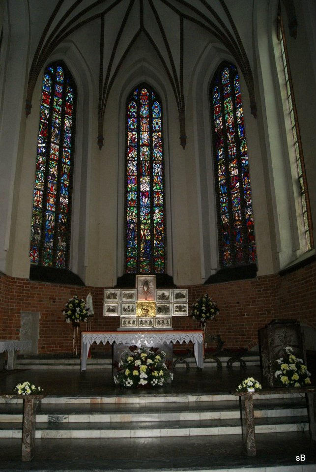 Prezbiterium w bazylice mniejszej w Chojnicach.